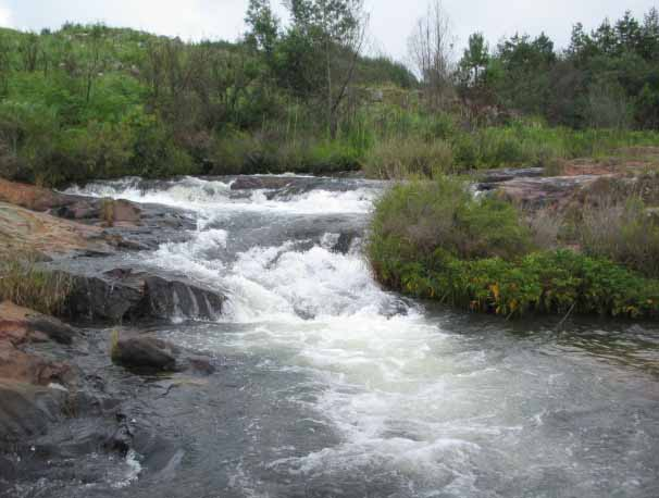 Национални парк Њанга, Децембар 2004, Аутор Др. Влада Рајковић, објављено по експлицитном одобрењу аутора